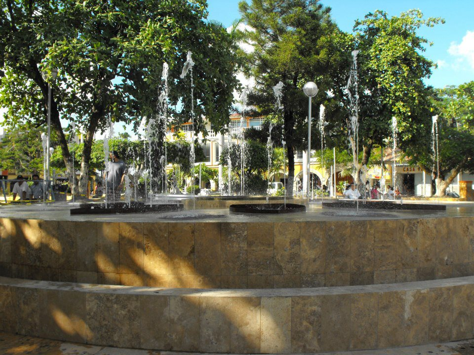 Fuente Tantoyuca (Cerca)